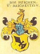 Johann Siebmacher: New Wappenbuch eingescannt aus: Horst Appuhn (Hrsg.), Johann Siebmachers Wappenbuch. Die bibliophilen Taschenbücher 538, 2. verb. Aufl , Dortmund 1989 Rheinische Blatt 128